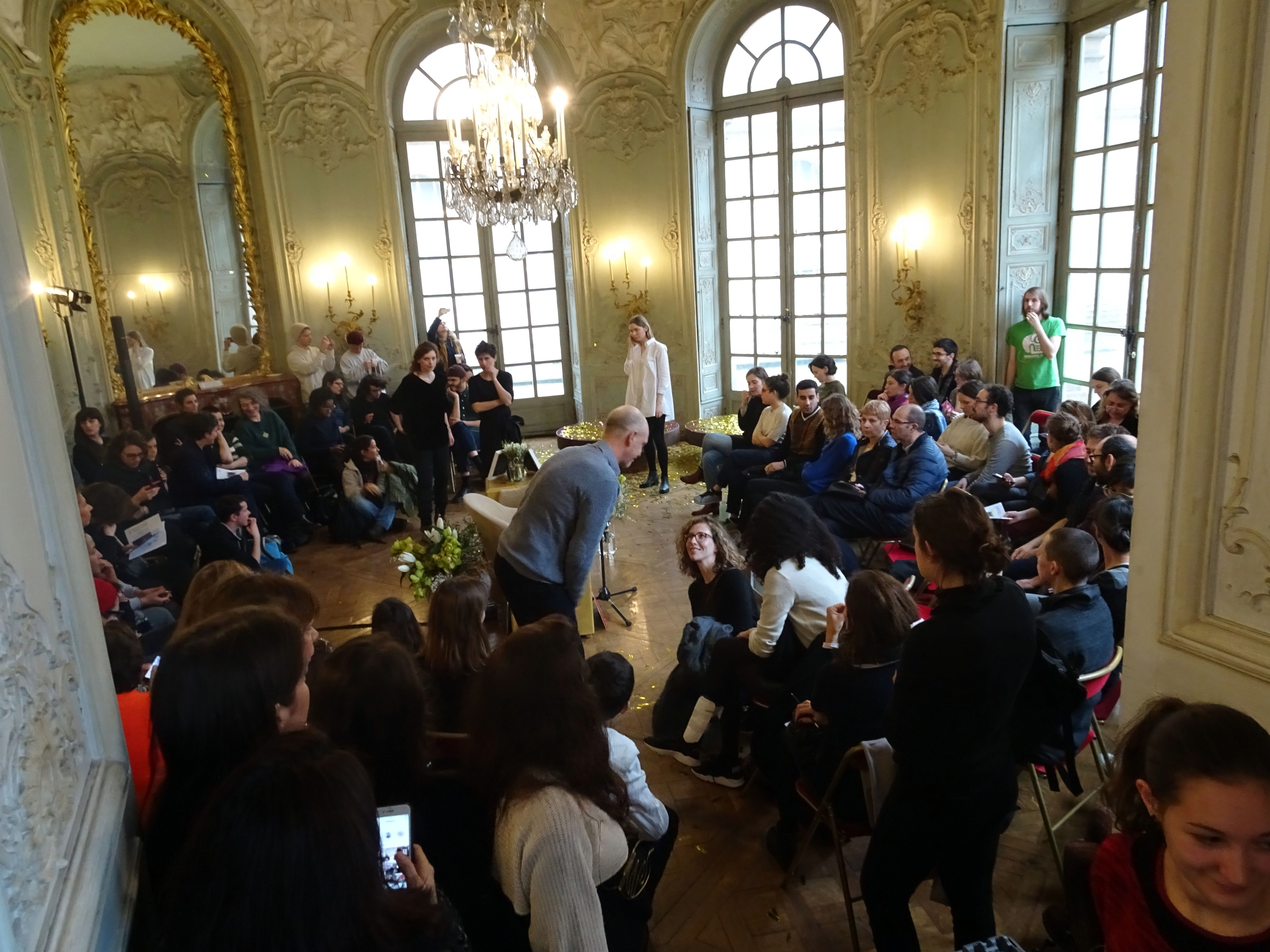 Art+Feminism 2017 à l’Hôtel de Soubise à Paris.